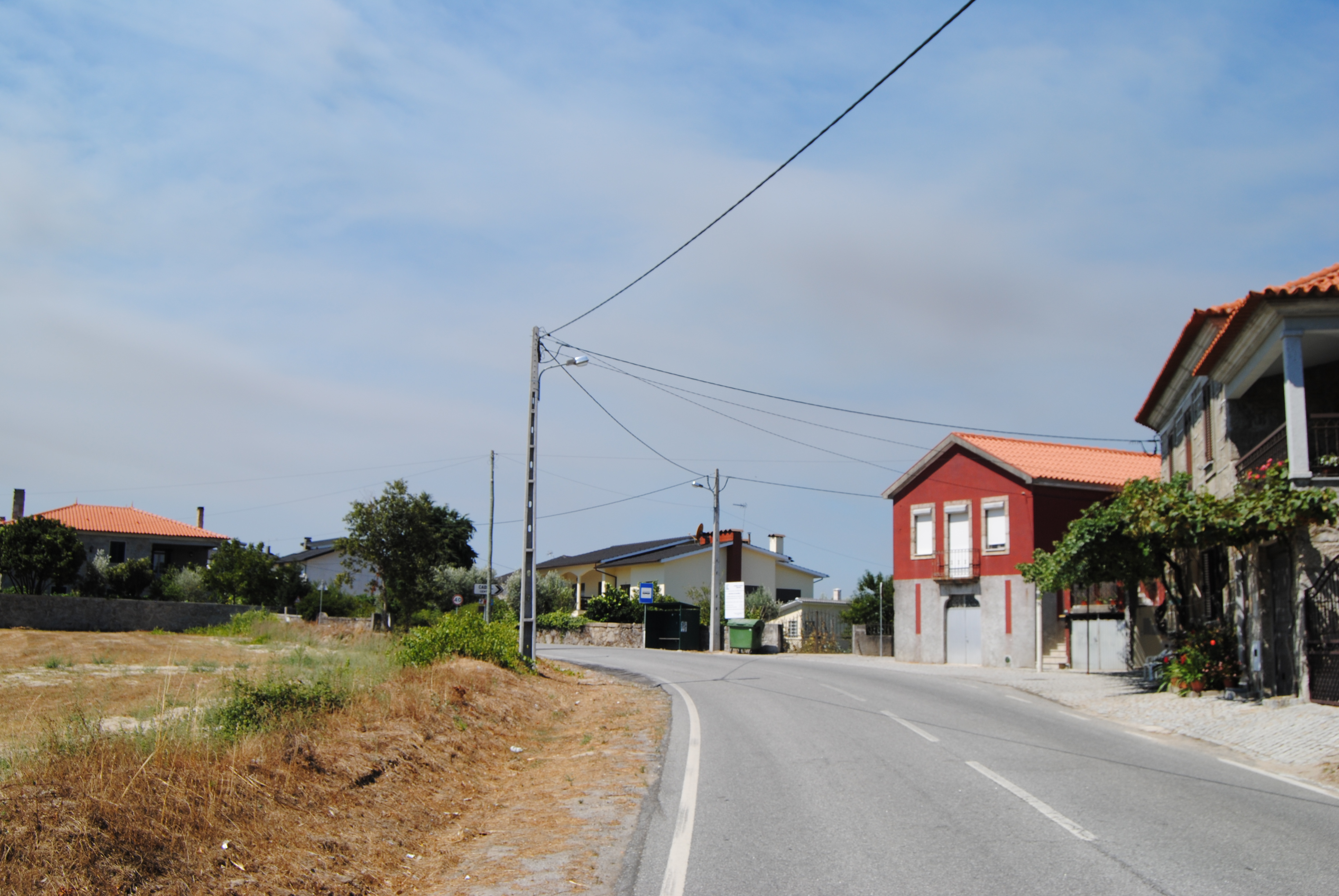 Cabril Estrada N 229-2, Rua da Escola